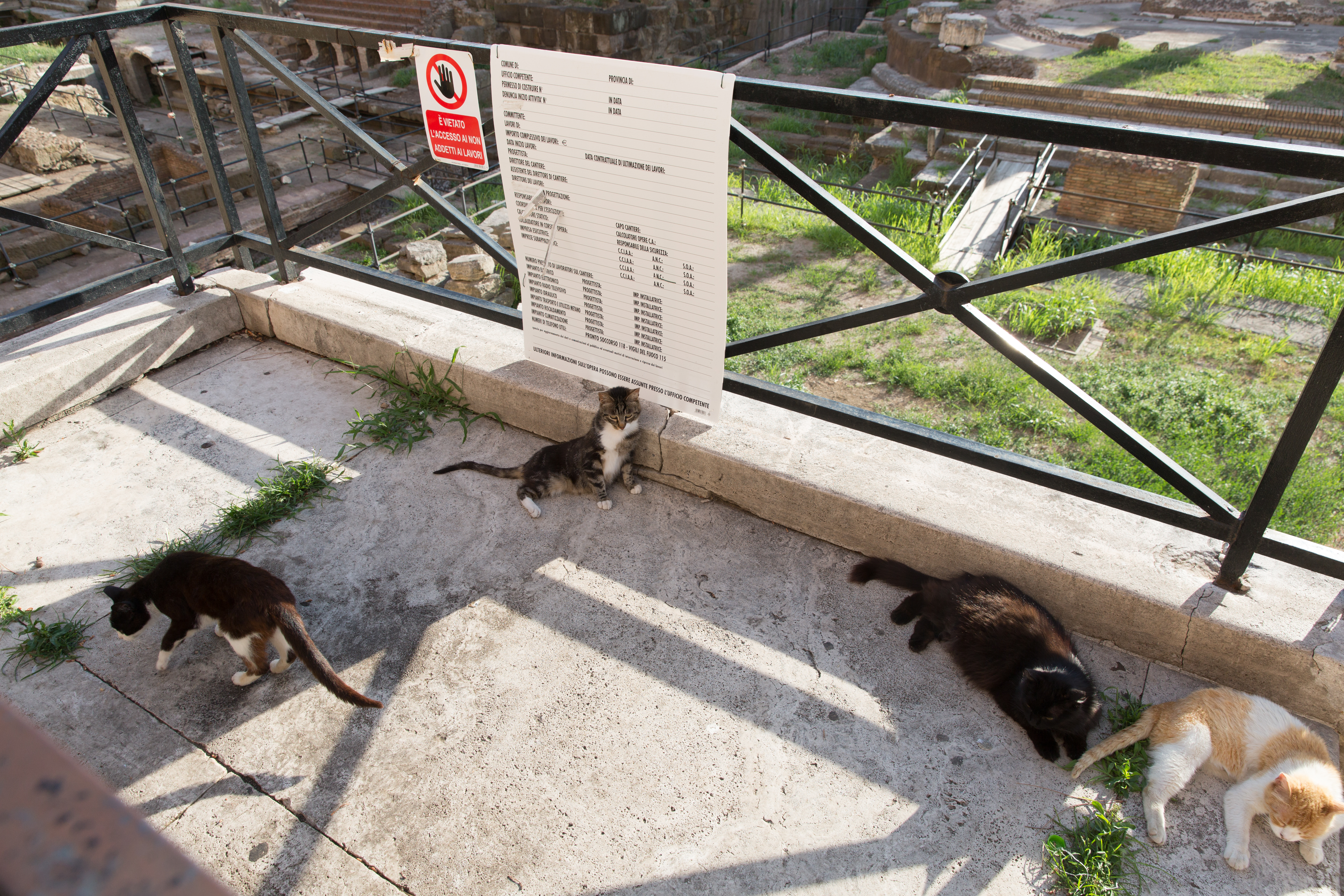 Cat Sanctuary, Cats, Largo di Torre Argentina, Rome - 398